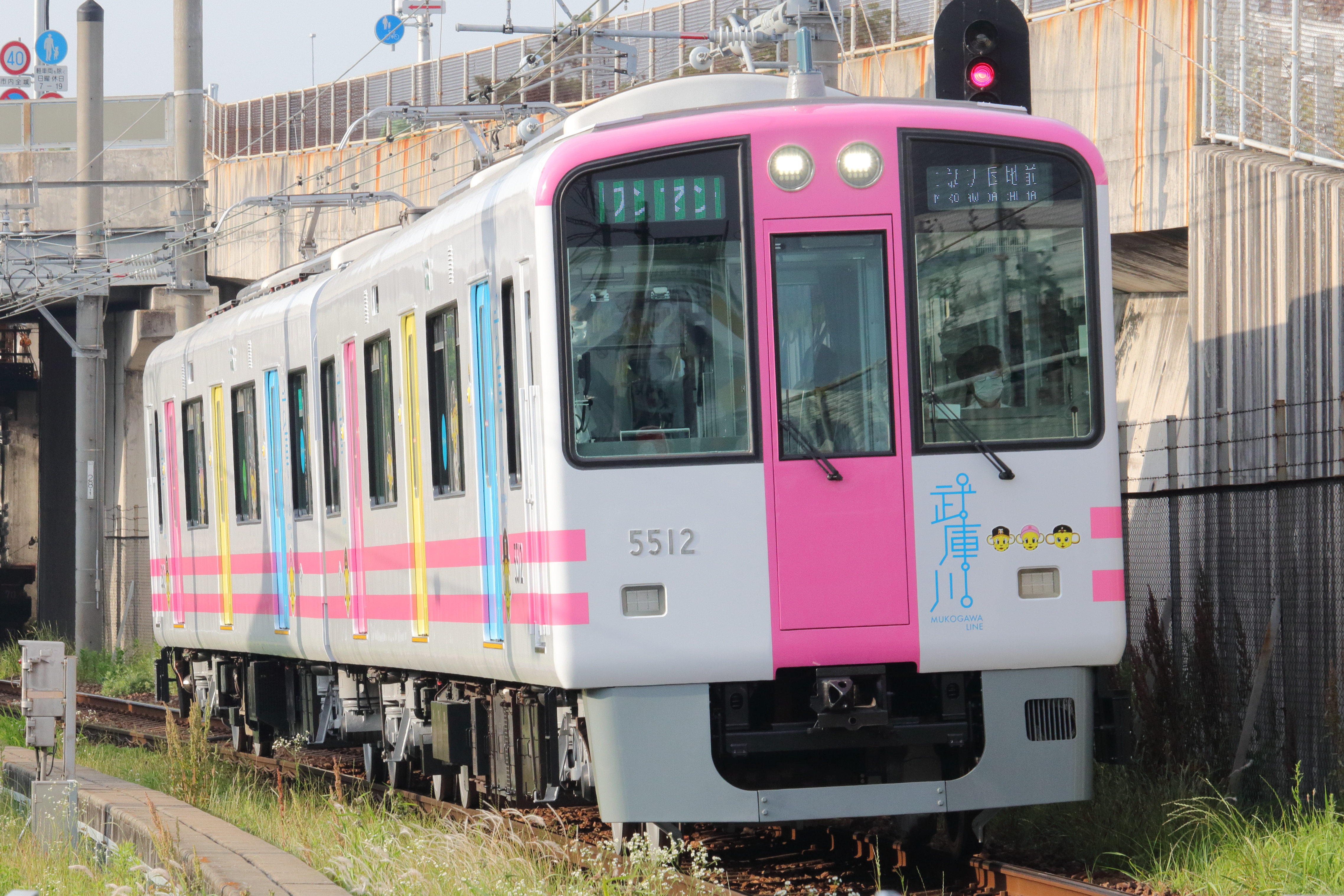 阪神5500系 武庫川線 トラッキー号 洲先 - 東鳴尾間